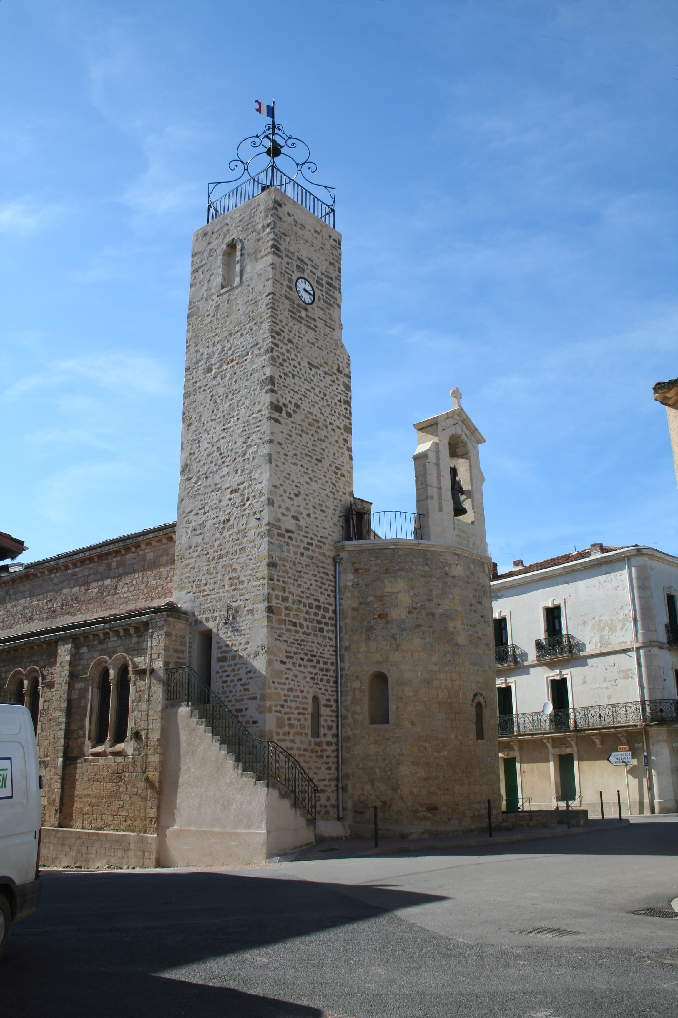 Lieuran-lès-Béziers (Hérault) - église Saint-Martin.